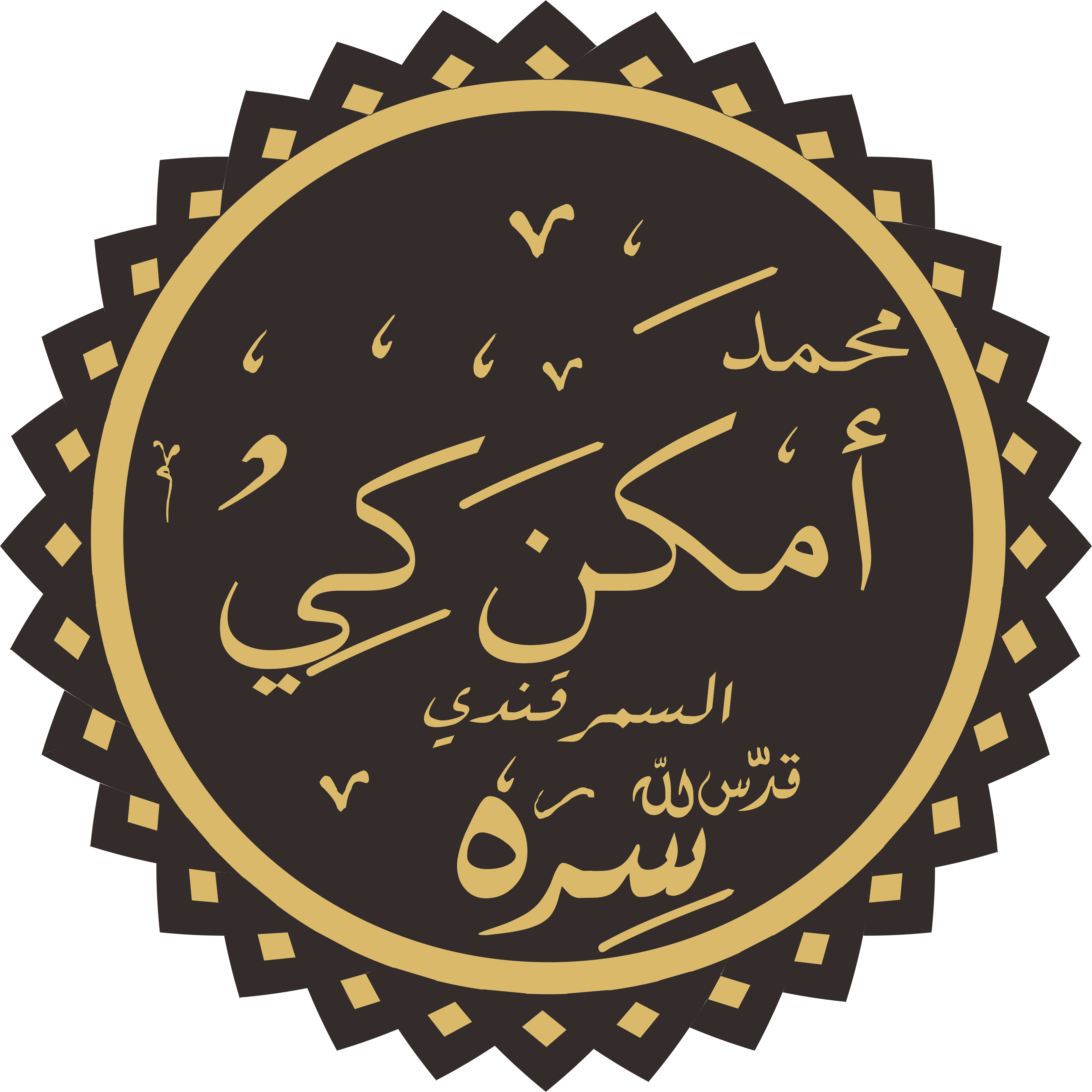 Syekh amkanaki